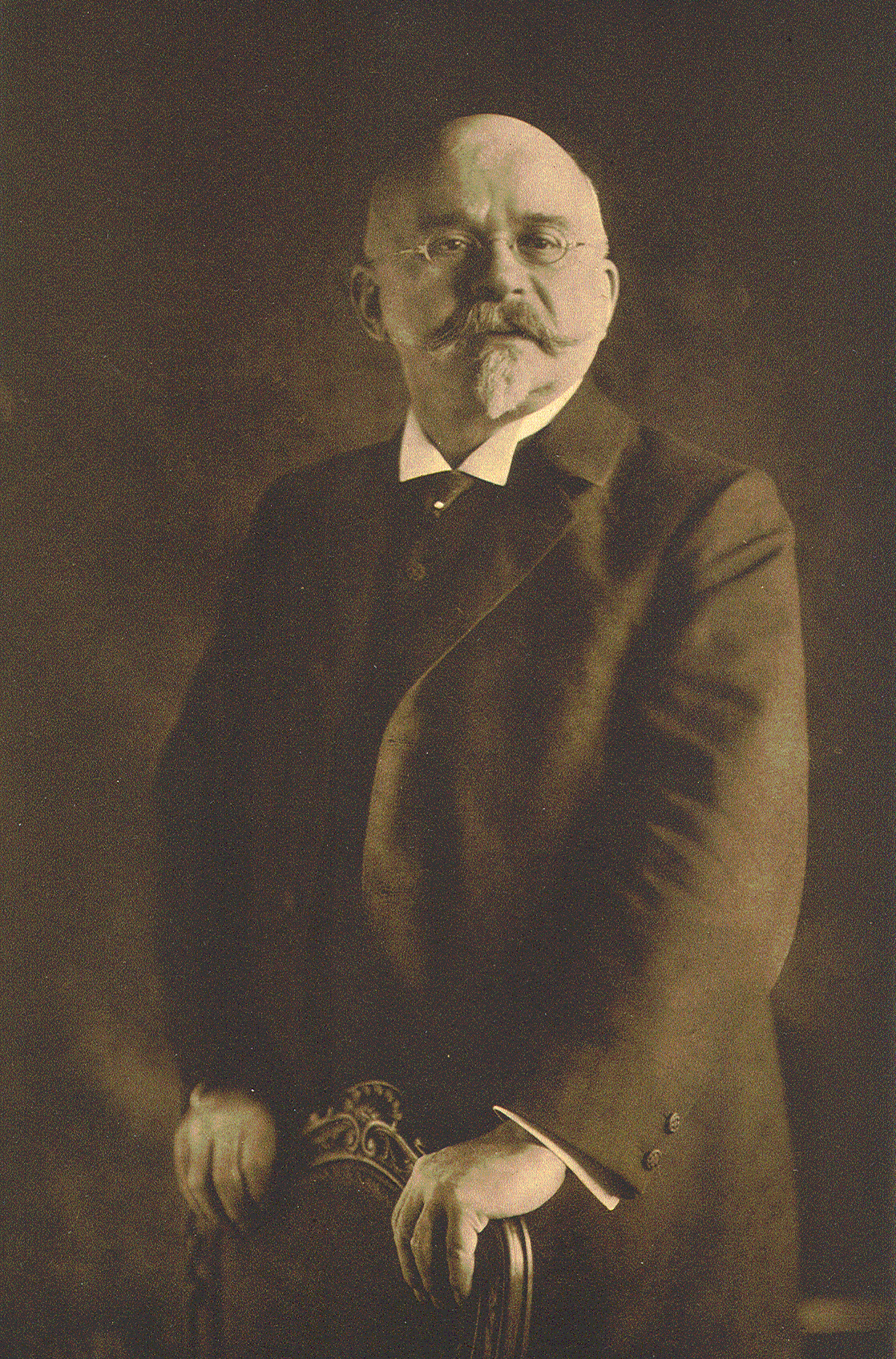 Julius Scharlach (1842–1908), Hamburger Anwalt und Kolonialunternehmer